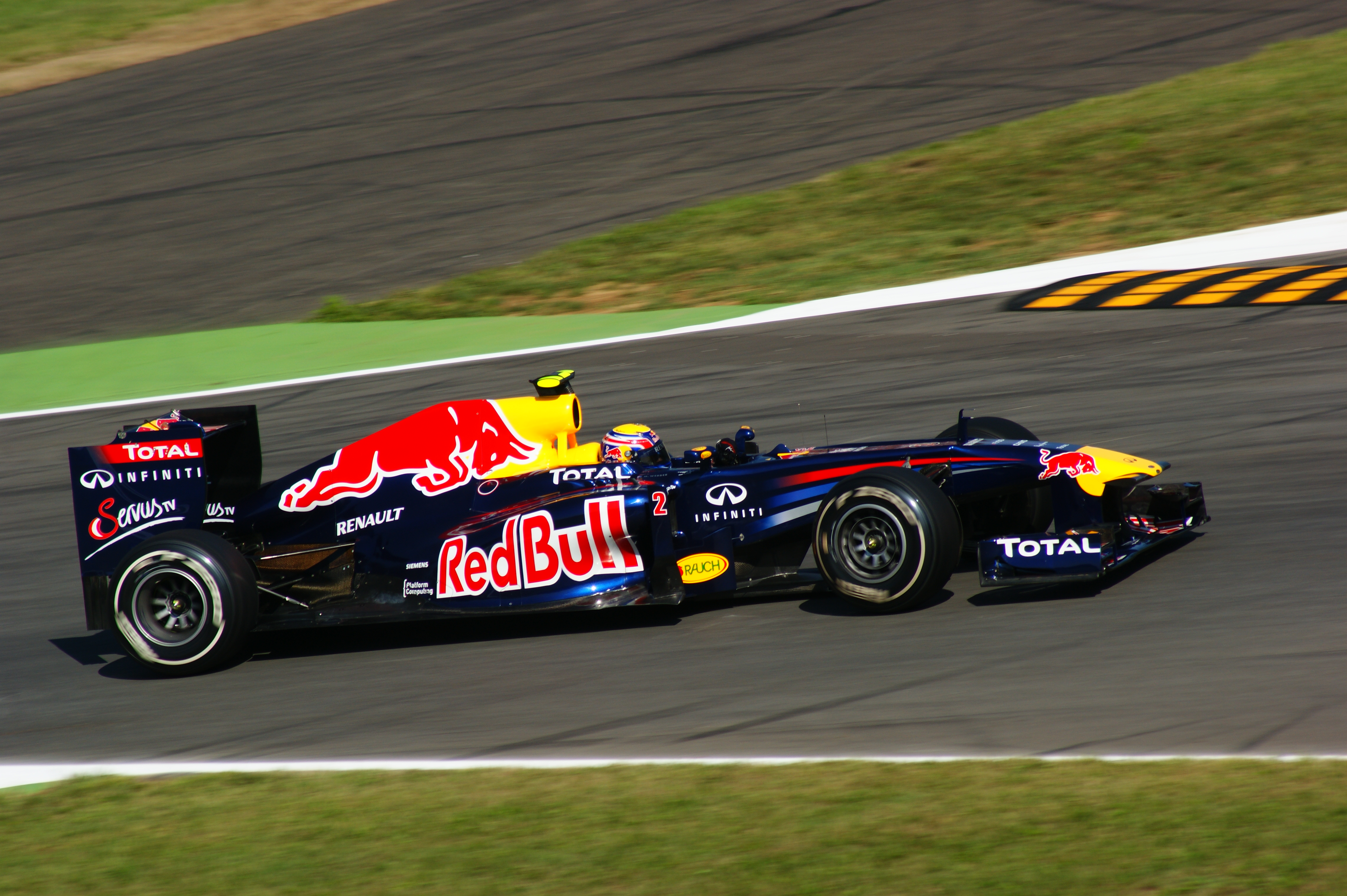 Mark Webber alla prima variante Monza 2011